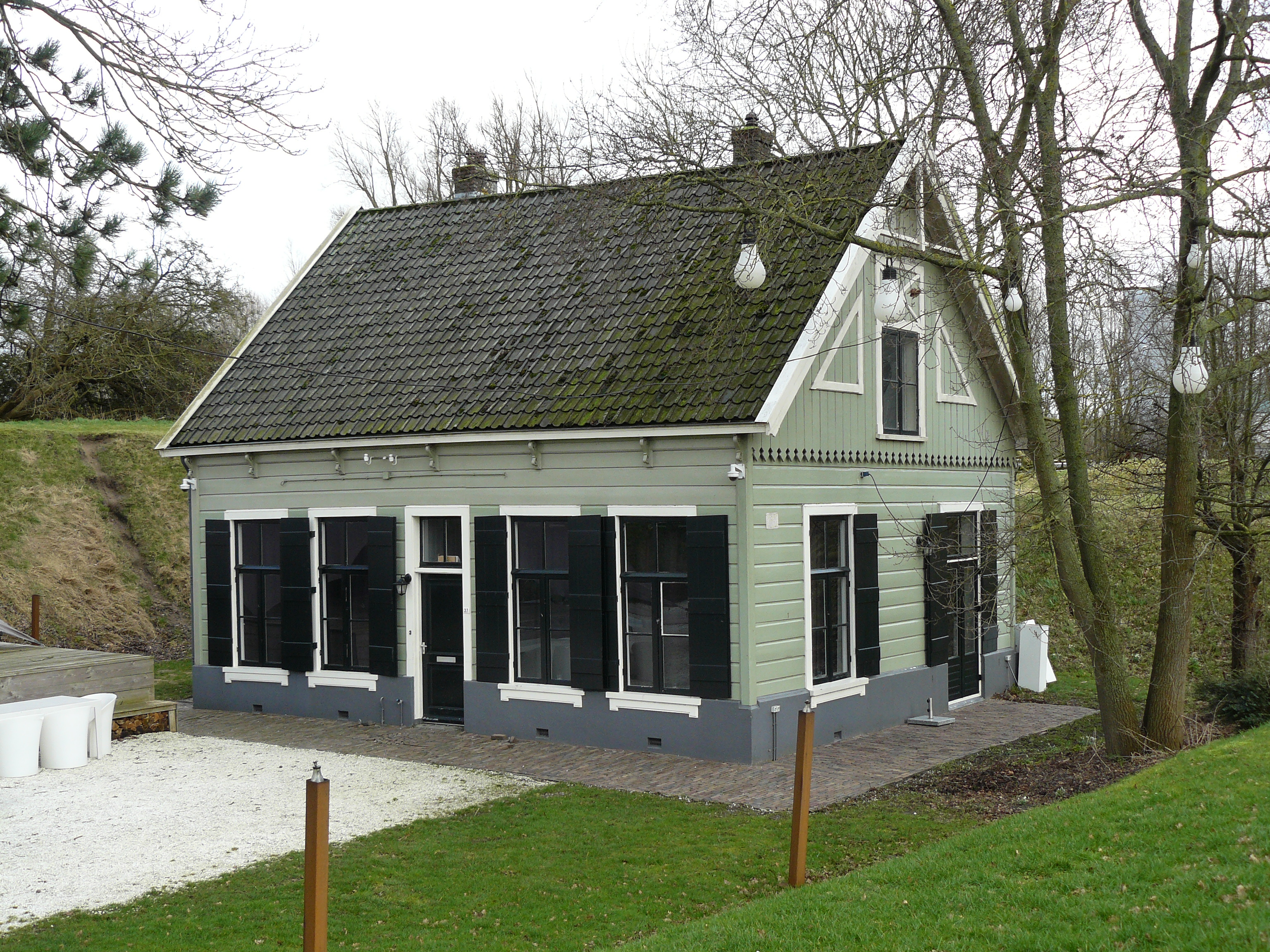 De gerestaureerde fortwachterswoning.